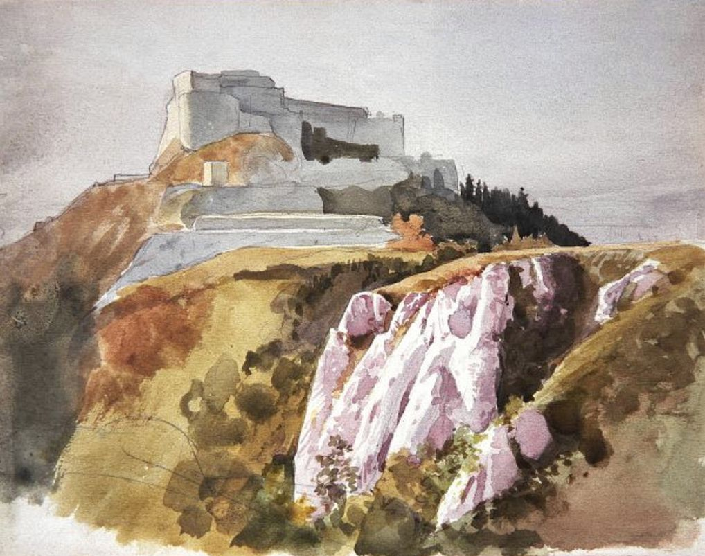 Blick zur Festung Hohenneuffen. (Lavierte Zeichnung)